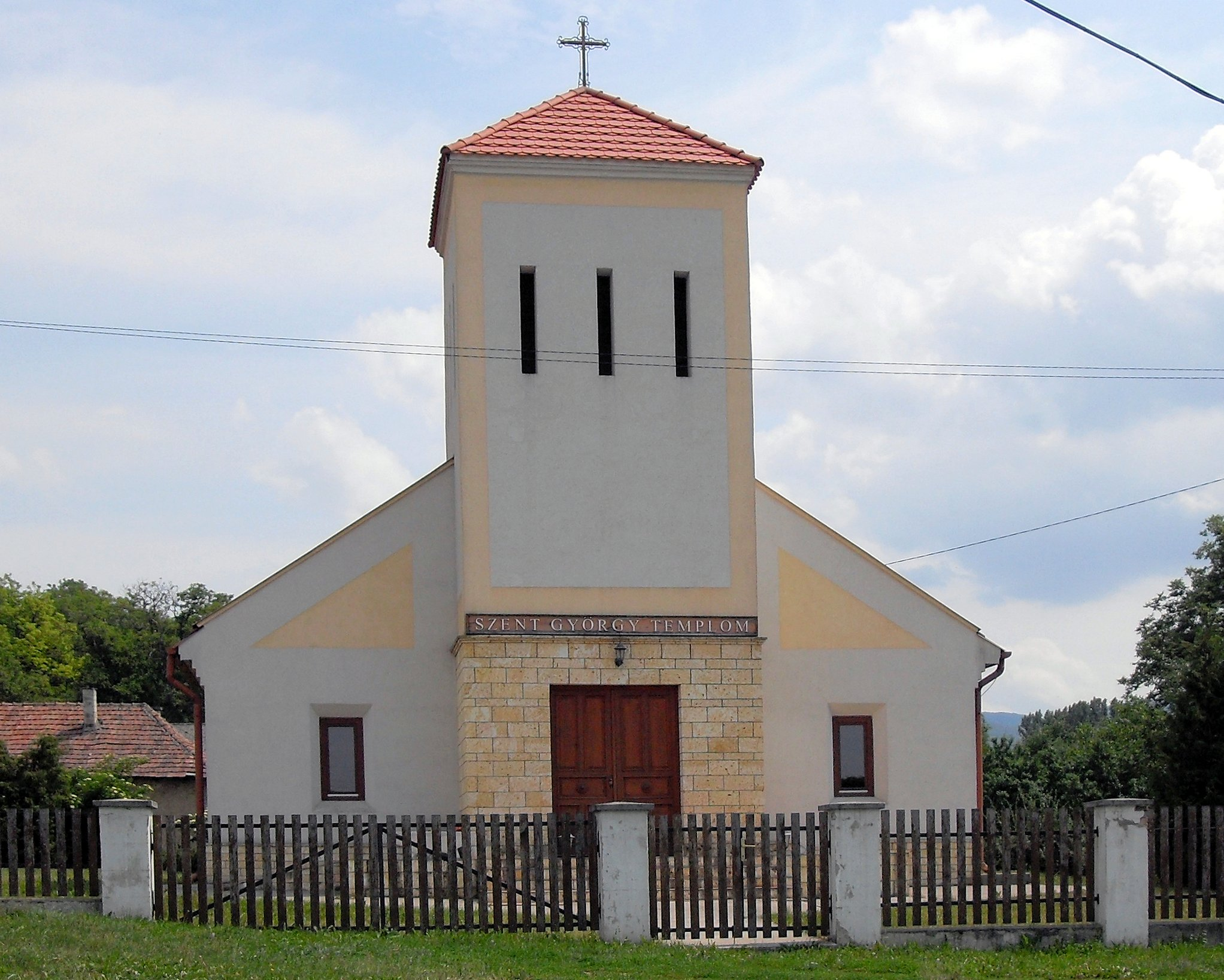 Szent György Római katolikus templom Zsujta